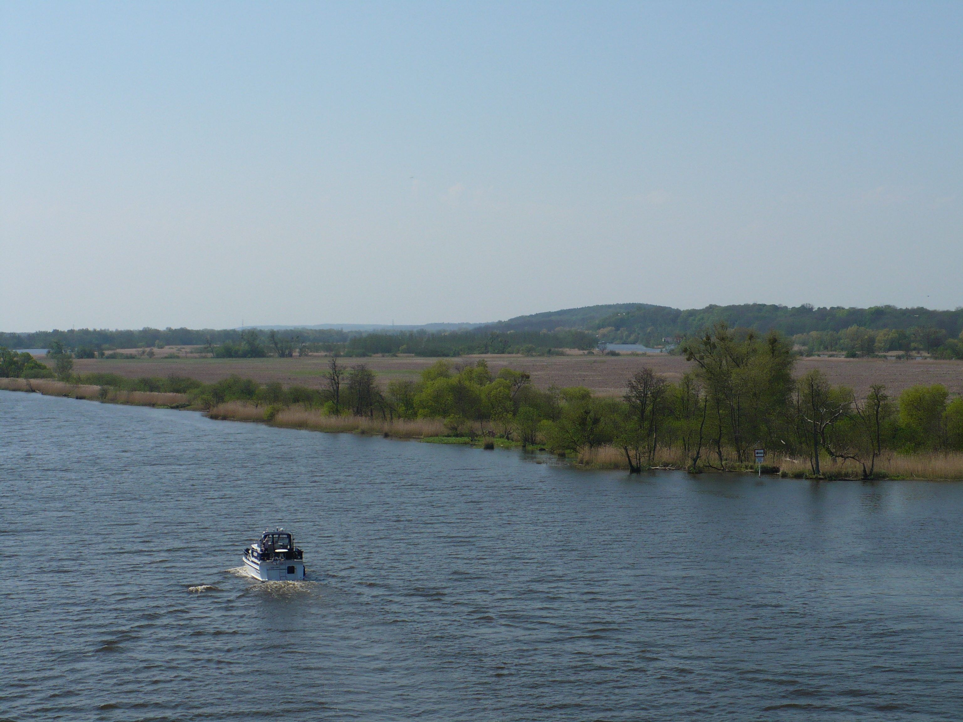 Międzyodrze pod Szczecinem